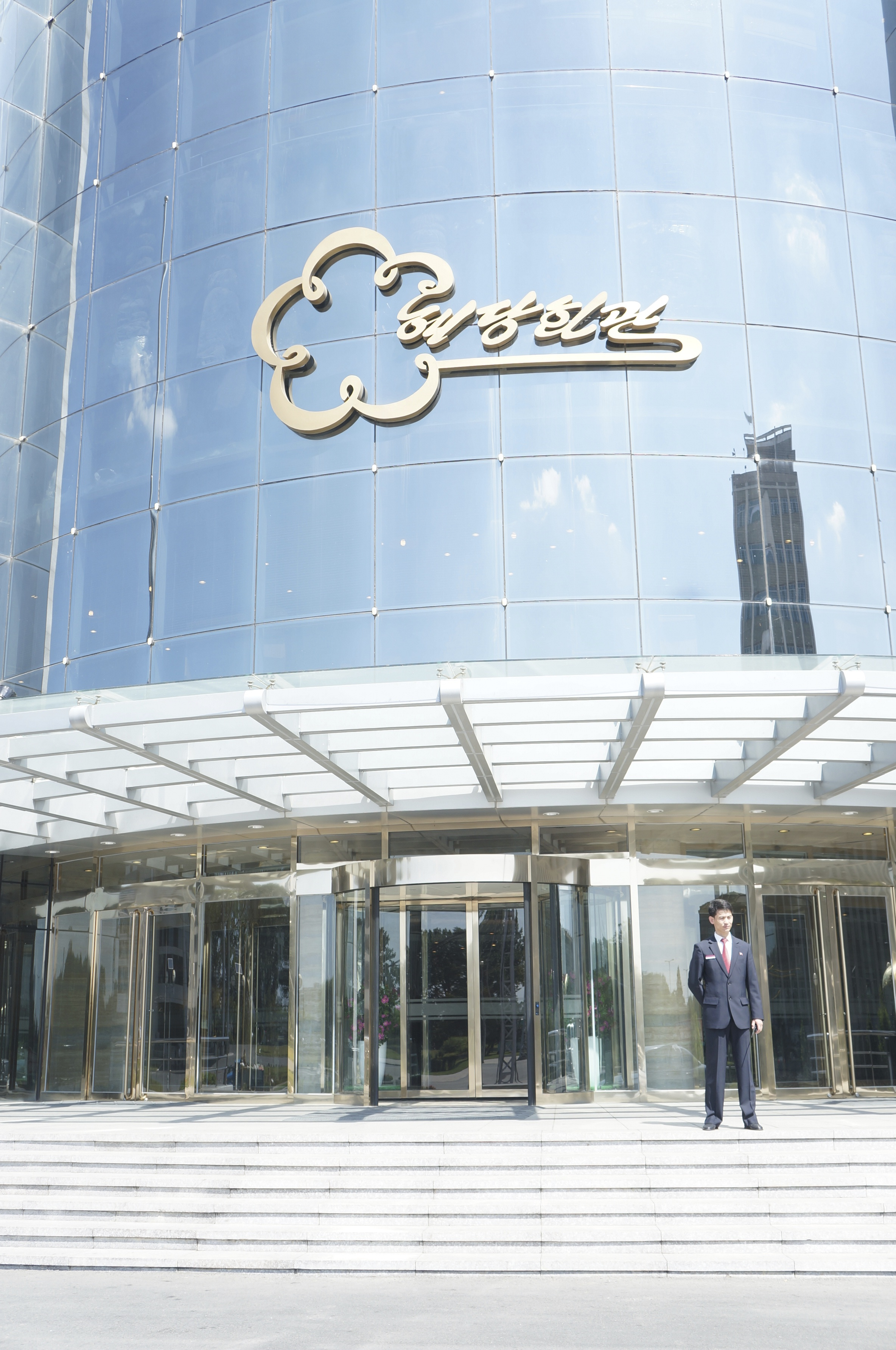 Haedanghwa Health Complex, Pyongyang